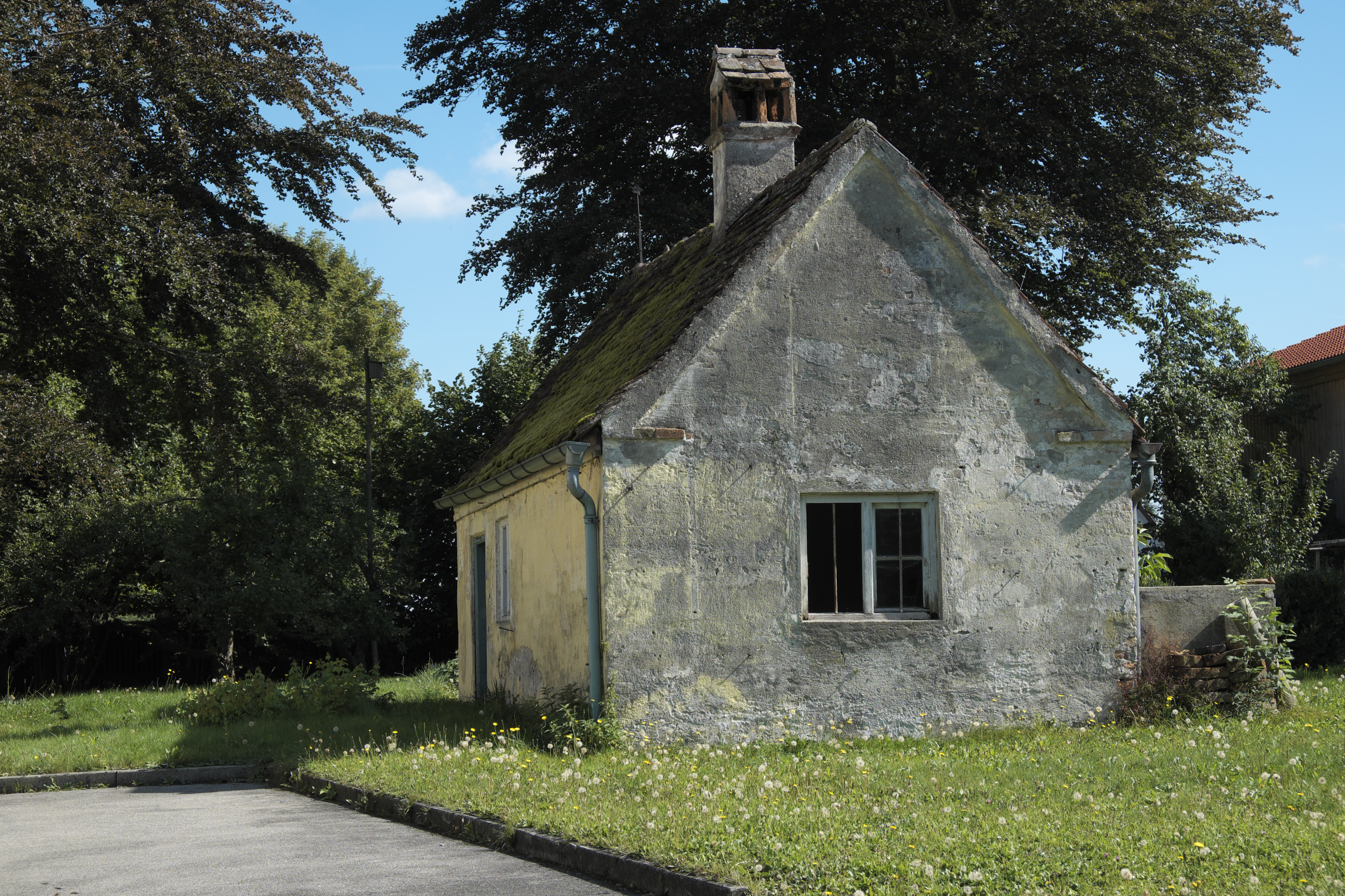 Ehemaliges Wasch- und Backhaus des Pfarrhauses in Kaufering im Landkreis Landsberg am Lech (Bayern/Deutschland)